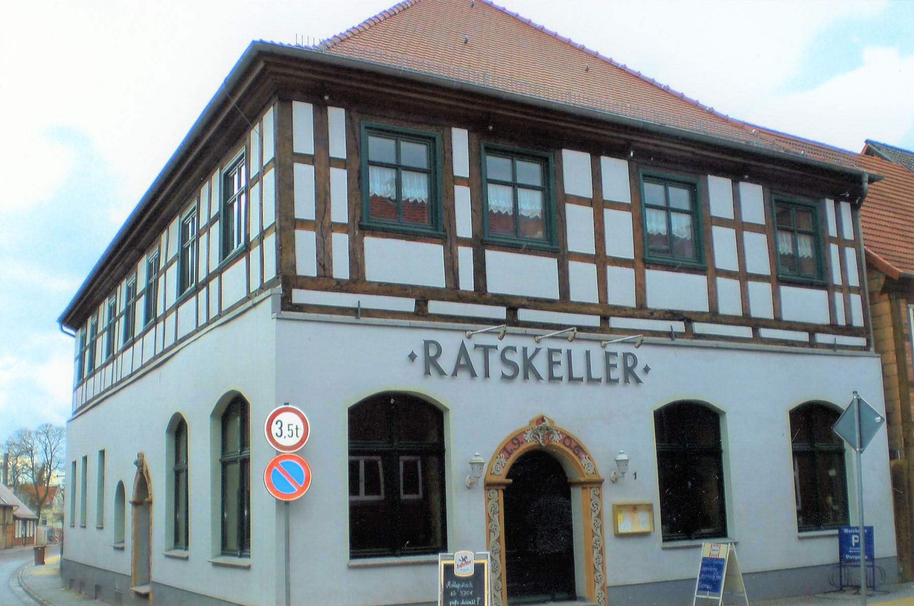 Ratskeller Seehausen; traditionsreiches Lokal. Das Gebäude steht unter Denkmalschutz.